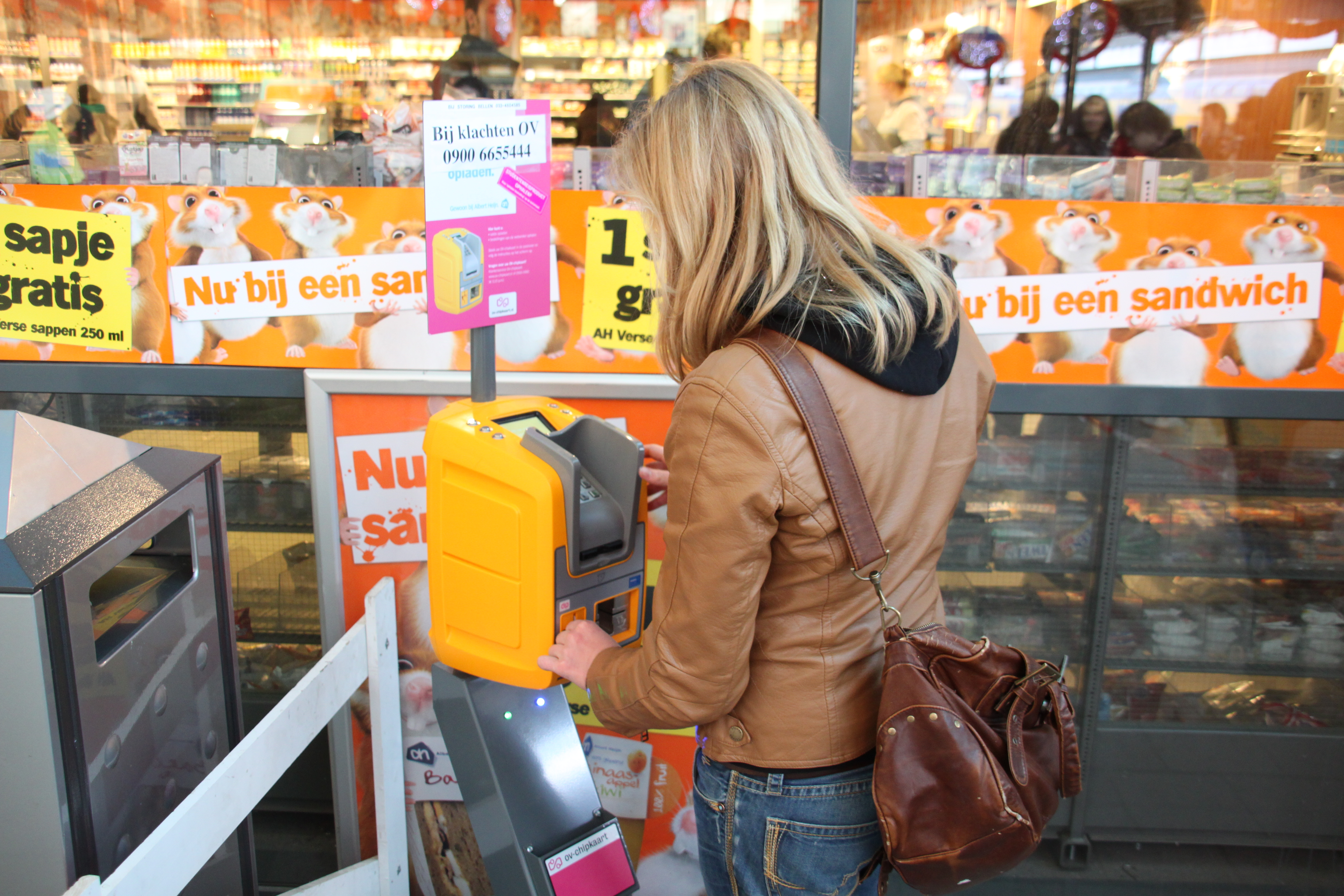 Een verkoopapparaat van de OV-chipkaart in Nijmegen.